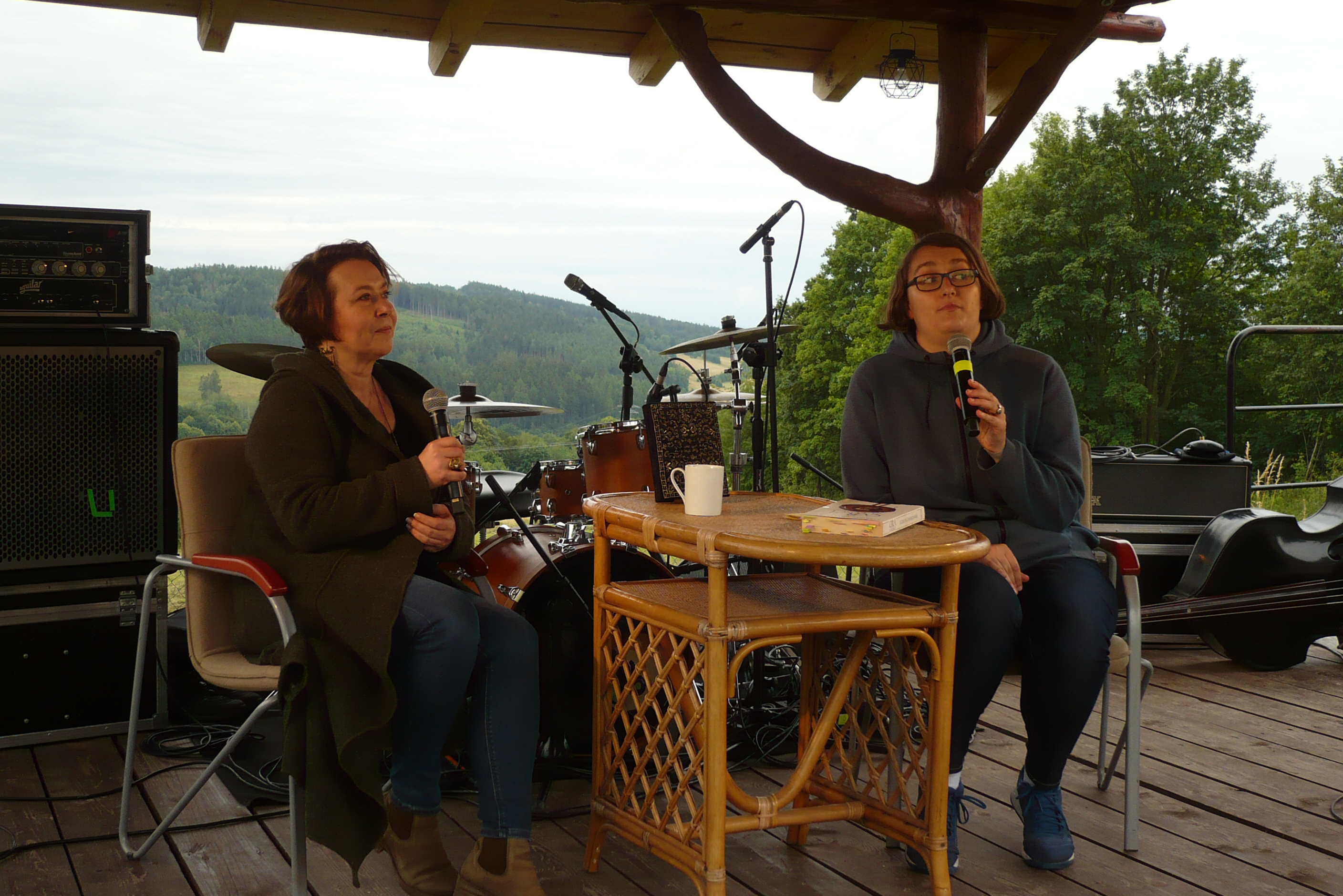 Elżbieta Cherezińska, VI Festiwal Góry Literatury, 11.07.2020 r.